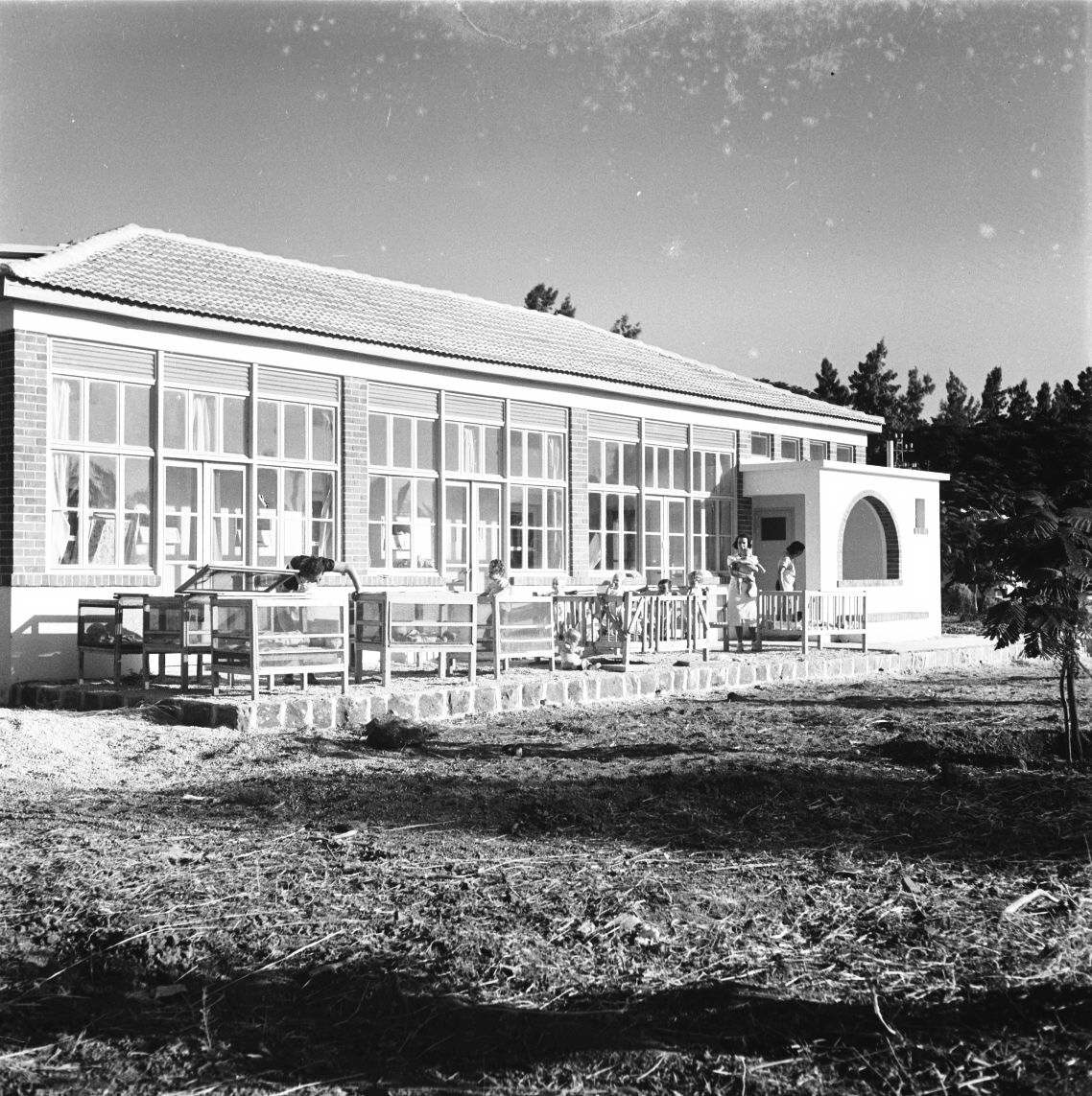 אוסף צילומים של הצלם זולטן קלוגר טווח מספרי התשלילים 25603 - 25798: 25 שנה לדגניה ב - בית הילדים